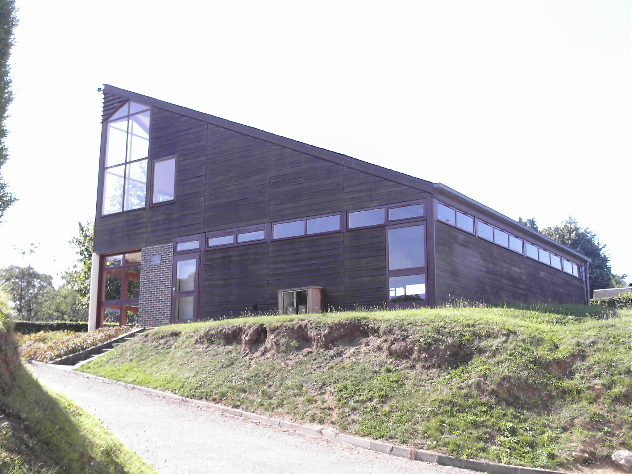 La salle des fêtes de Wambez se trouve au millieu de la commune (60380)